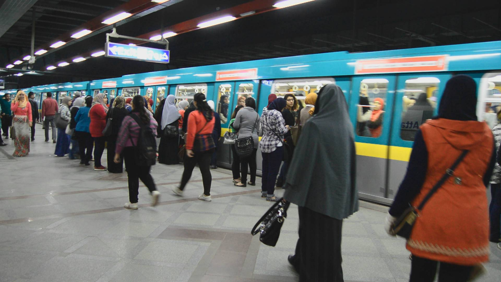 Станция Каирского метро "Аттаба"? Третья линия."Женские вагоны" метропоезда.